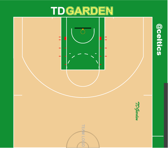 セルティクスホームコート配色